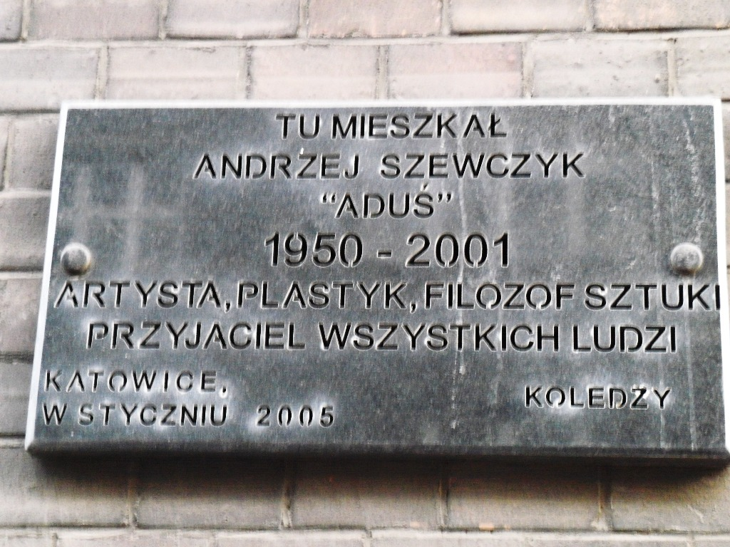 tablica ku czci Andrzeja Szewczyka na fasadzie budynku przy ul. T. Kościuszki 56 w Katowicach